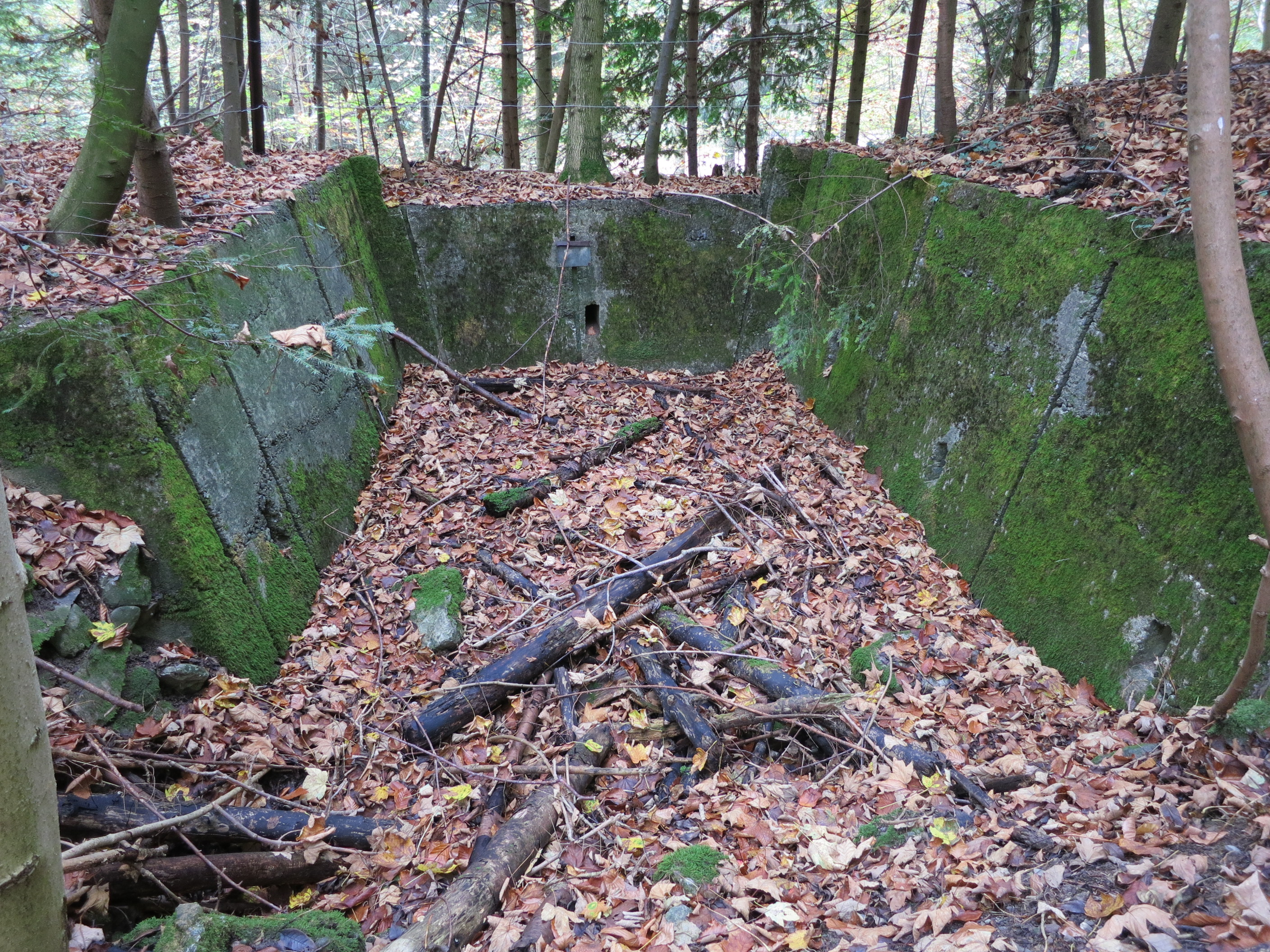 Festung Uetliberg, Uitikon ZH, Schweiz